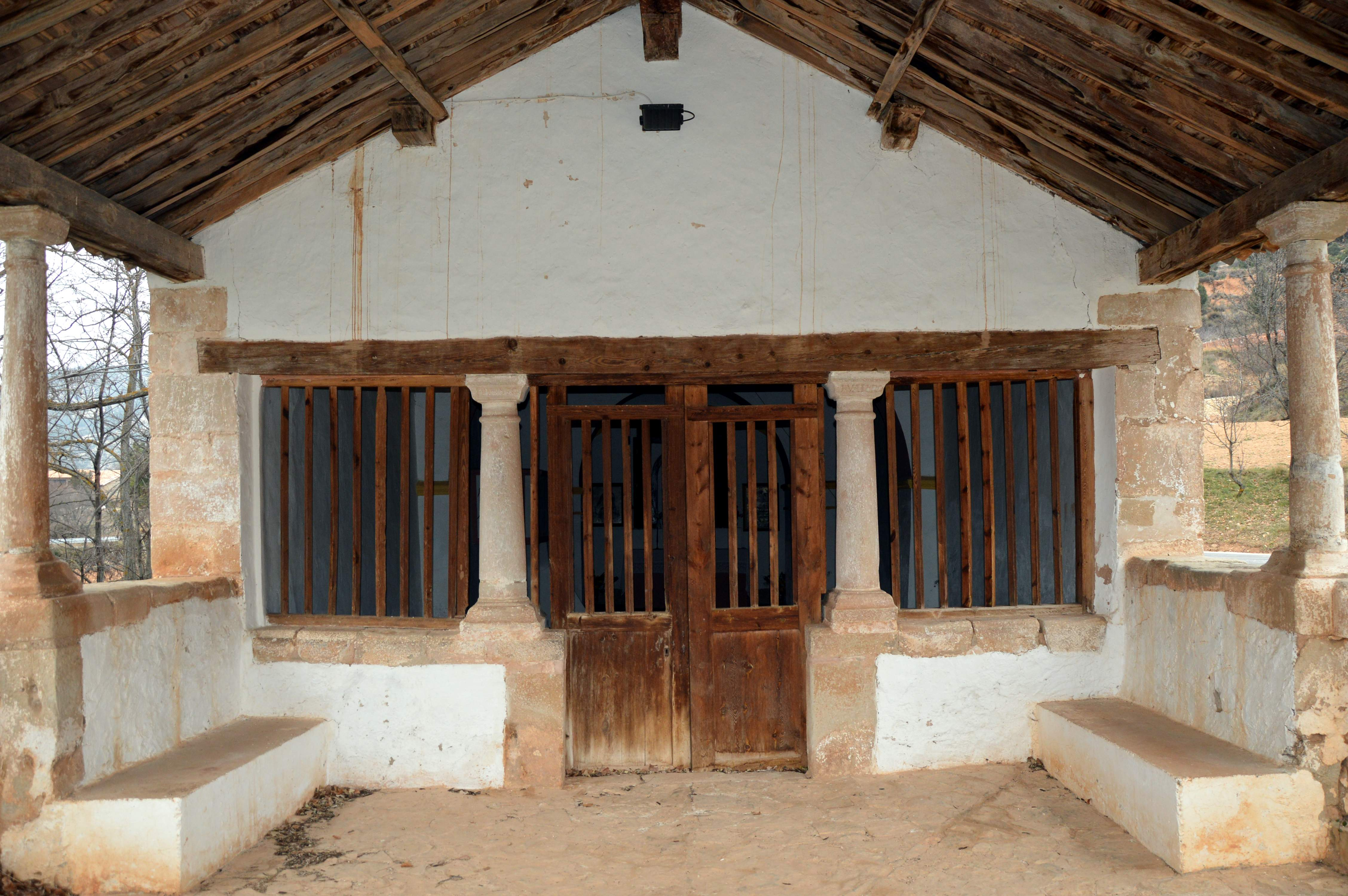 Detalle de la entrada a la Ermita de la Purísima en Puebla de San Miguel (Valencia), 2019.